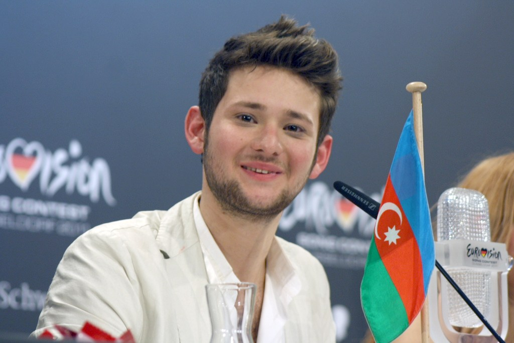 Eldar Gasimov